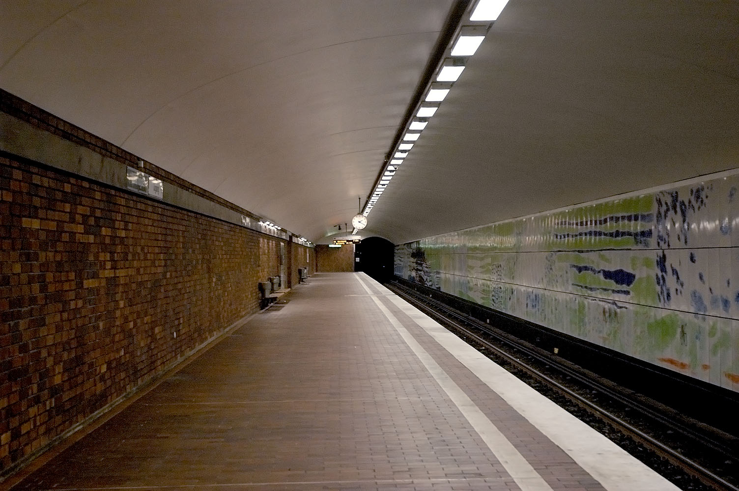 Mälarhöjden station on the Stockholm Metro.